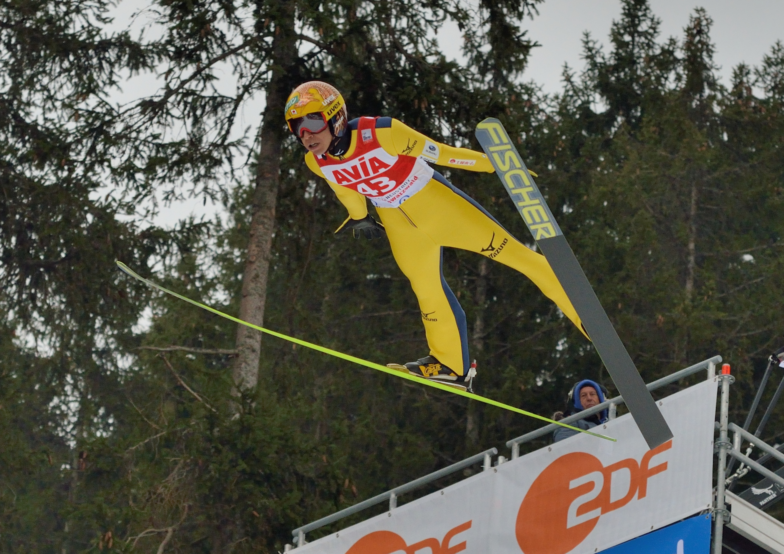 FIS Ski Weltcup Titisee-Neustadt 2016: Noriaki Kasai